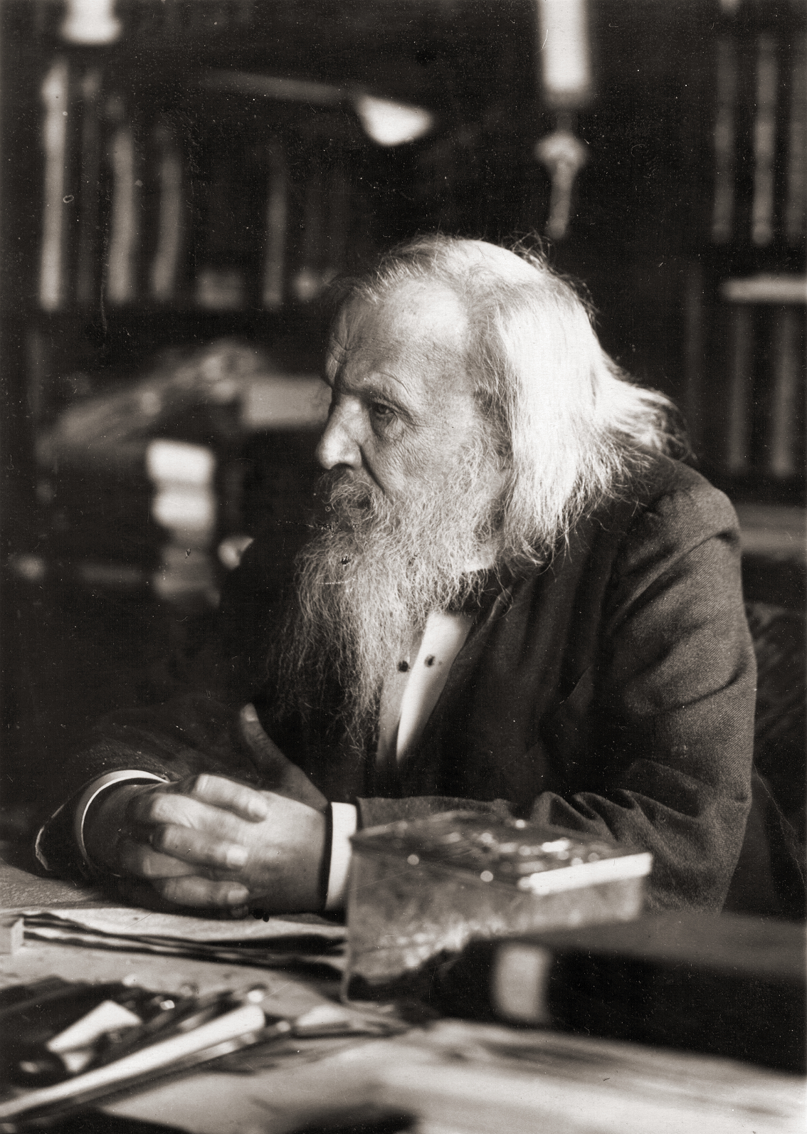 фото Дмитрия Ивановича Менделеева